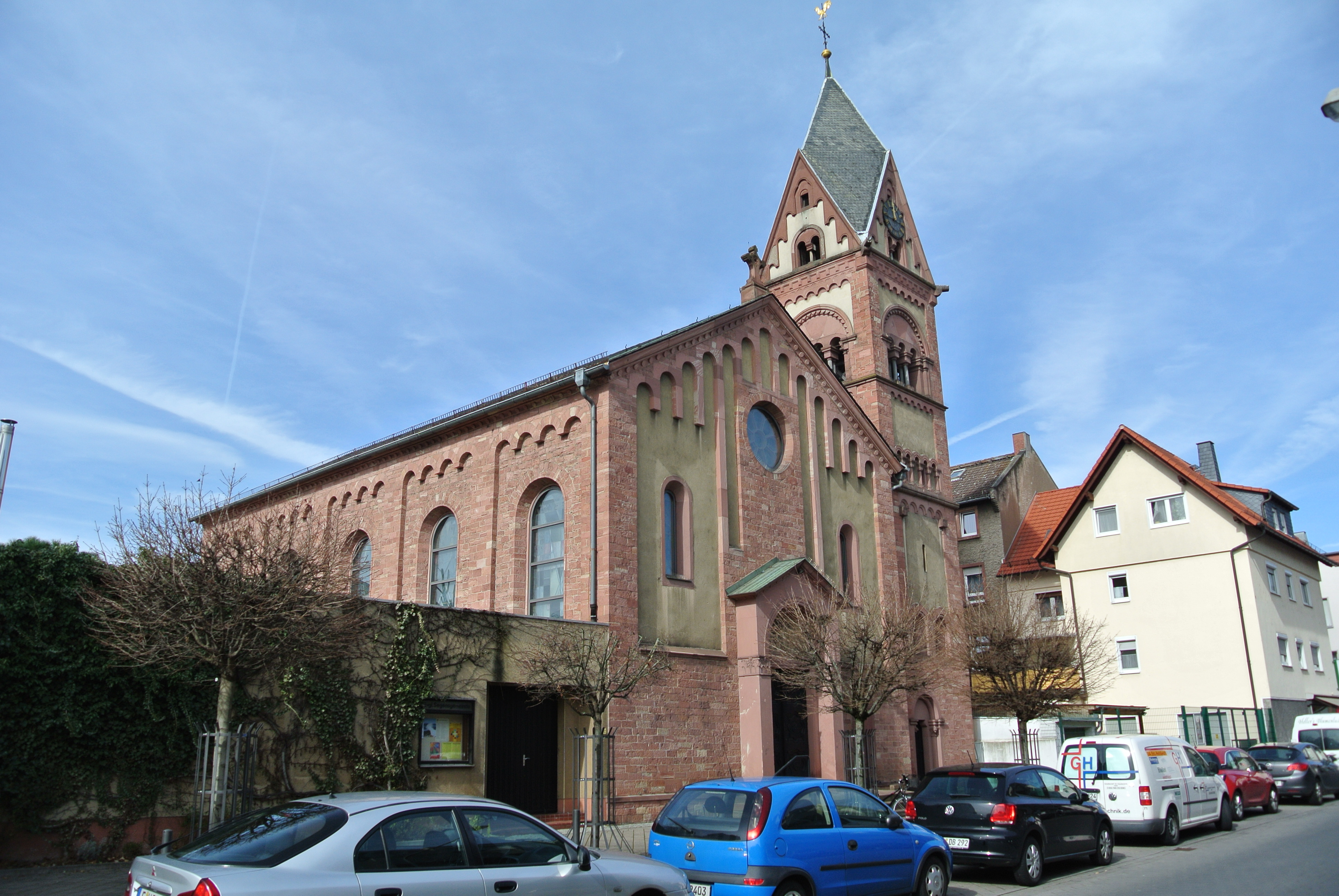 Evangelische Segenskirche in Frankfurt-Griesheim, Alte Falterstraße 6, neoromanische Hallenkirche von Heinrich Burnitz, 1865, Baudenkmal, von Südosten